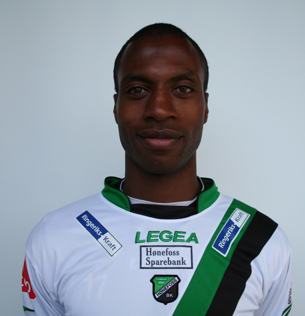 Leonidas "Leo" Olsen, norsk fotballspiller som spiller for Hønefoss Ballklubb.